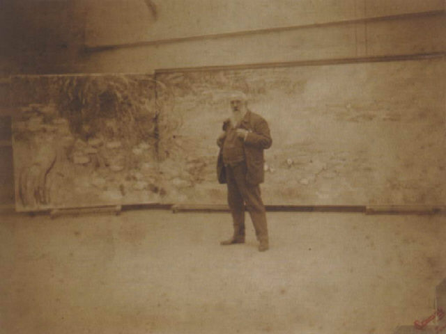 Title Claude Monet devant son oeuvre «Les nymphéas»